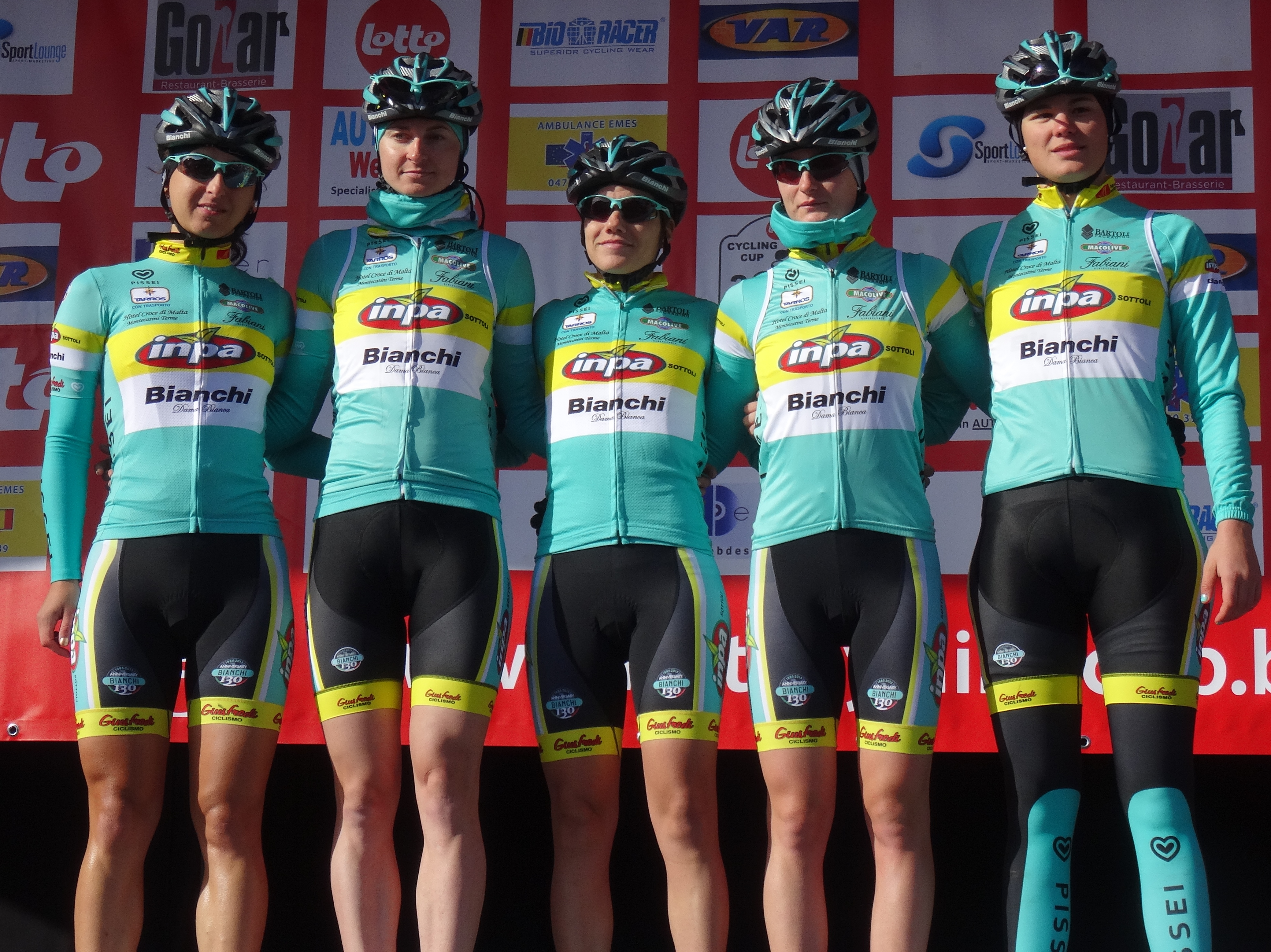 Reportage réalisé le mercredi 4 mars à l'occasion du départ du Samyn des Dames 2015 et du Samyn 2015 à Quaregnon, Belgique.